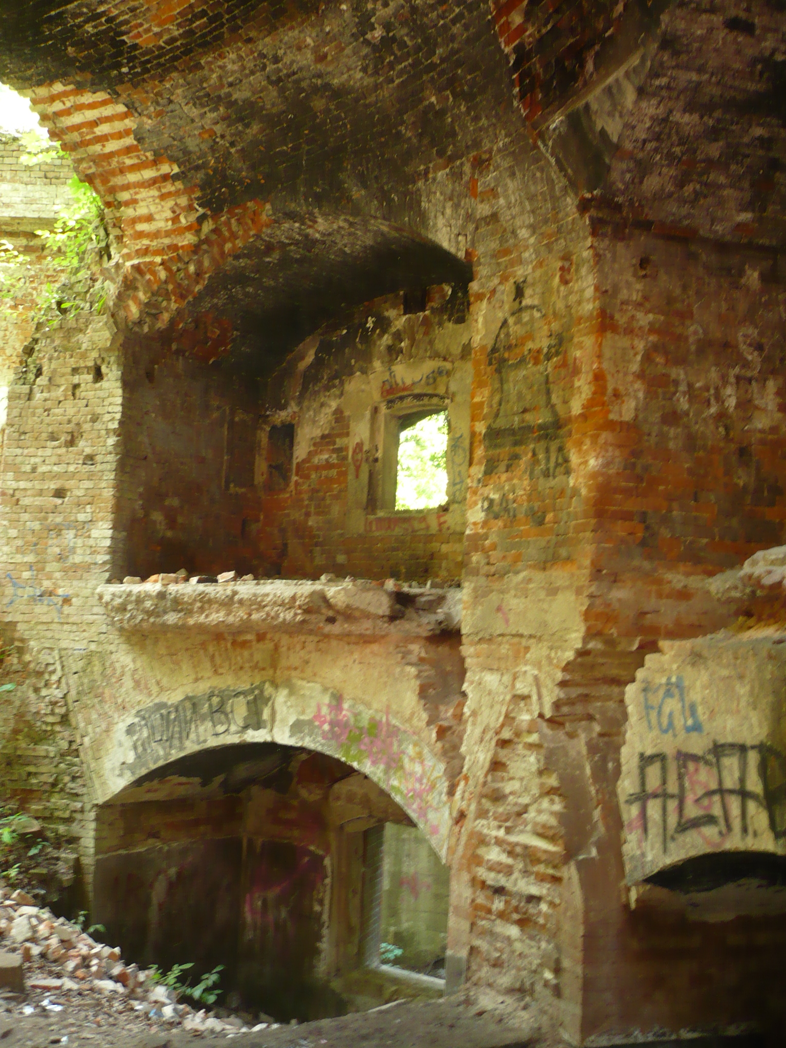 Lwów - wnętrze bastionu cytadeli